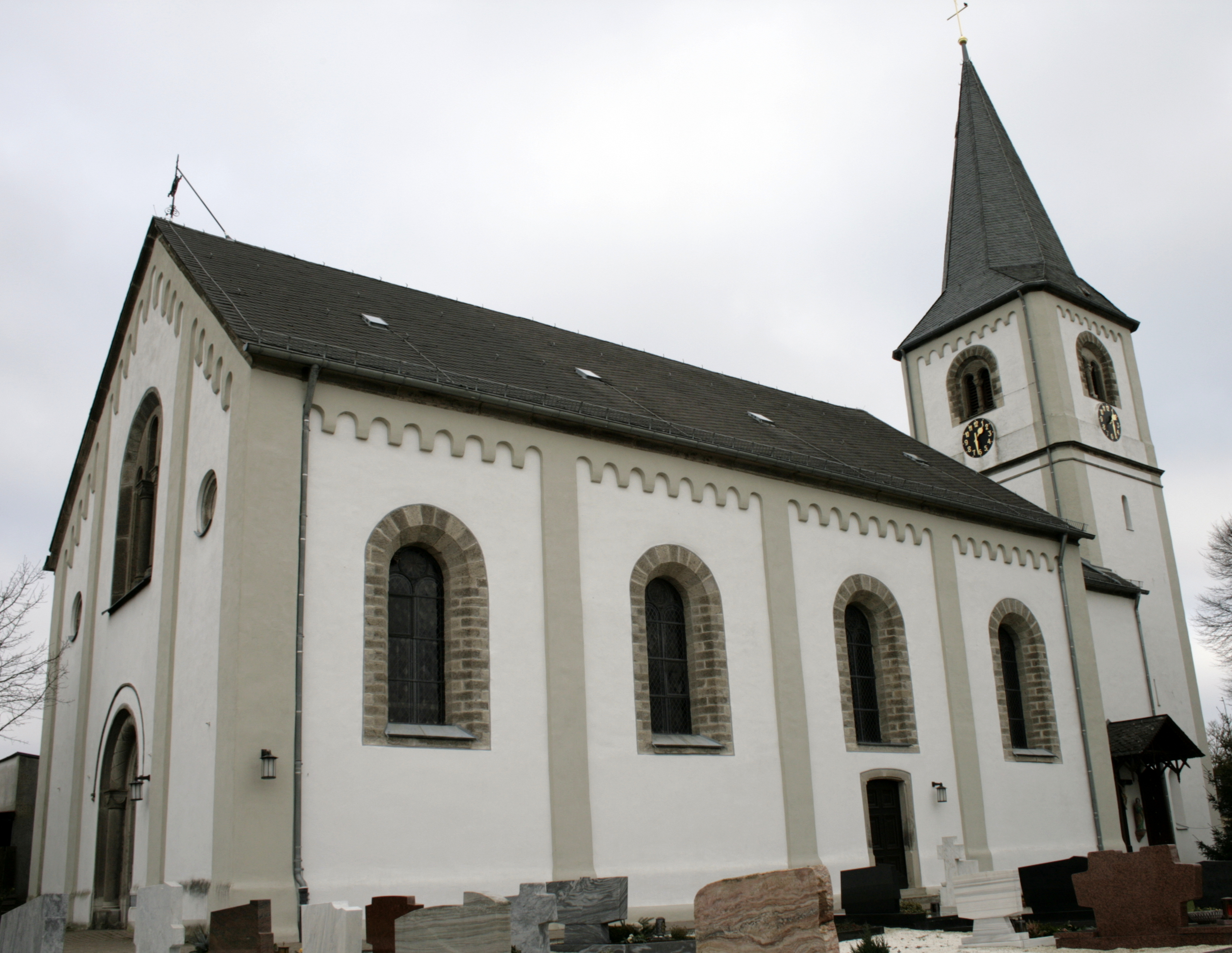 Kirche in Hadamar-Oberweyer, Deutschland